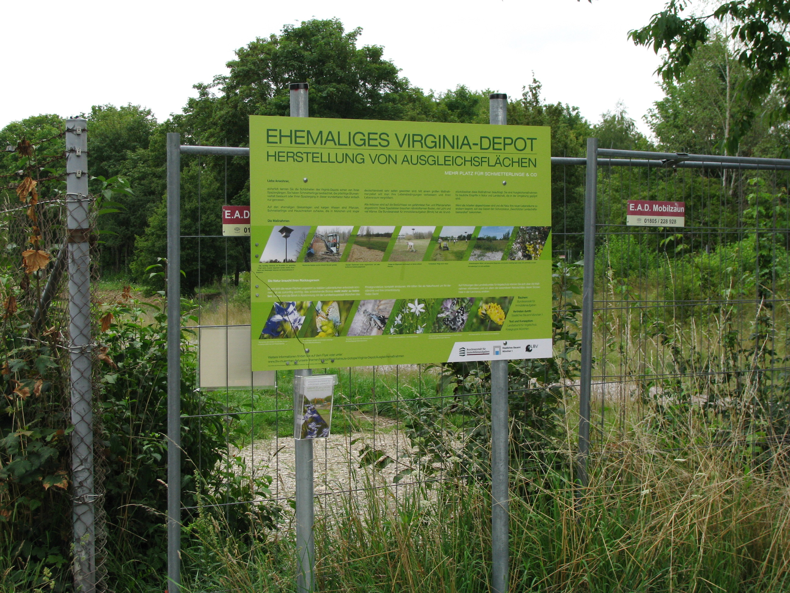 Zaun um das ehemalige Virginia-Depot mit Informationstafel zur heutigen Nutzung.